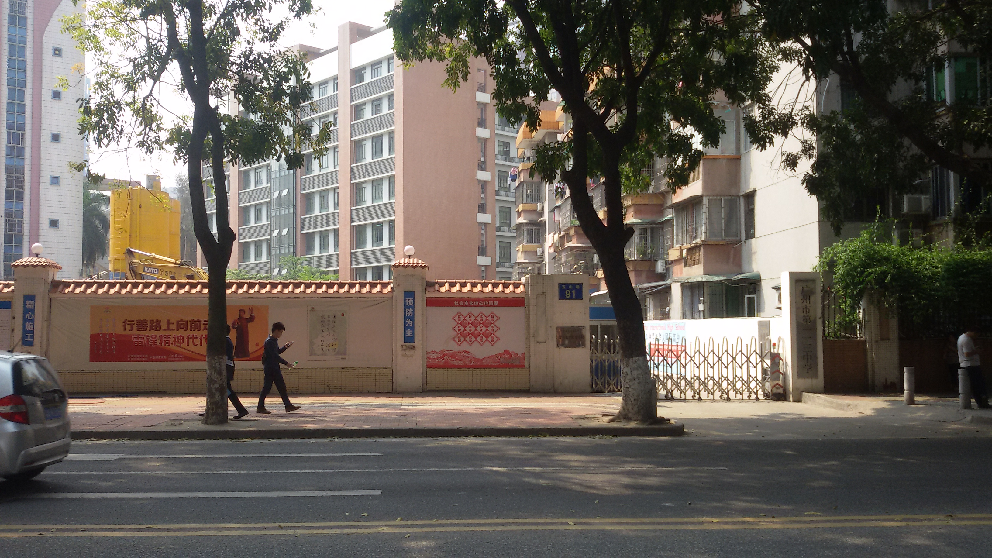 粵語: 广州市第113中学嘅正门